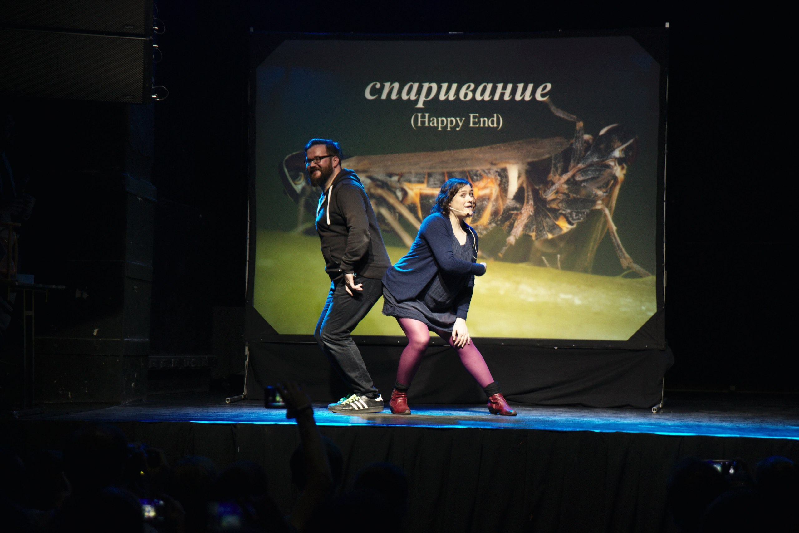 Российско-германский Science Slam, Петербург, клуб А2. Йоханнес Кречмар (PhD-студент Йенского университета имени Фридриха Шиллера, научный сотрудник Института компьютерных наук университета, сфера: computer science, тема: «Электромобиль Франкенштейна») и победительница Сюзан Груб (PhD-студент Берлинского университета имени Гумбольдта, сфера: биология, тема: «Странные брачные повадки цикадки вьюнковой»)